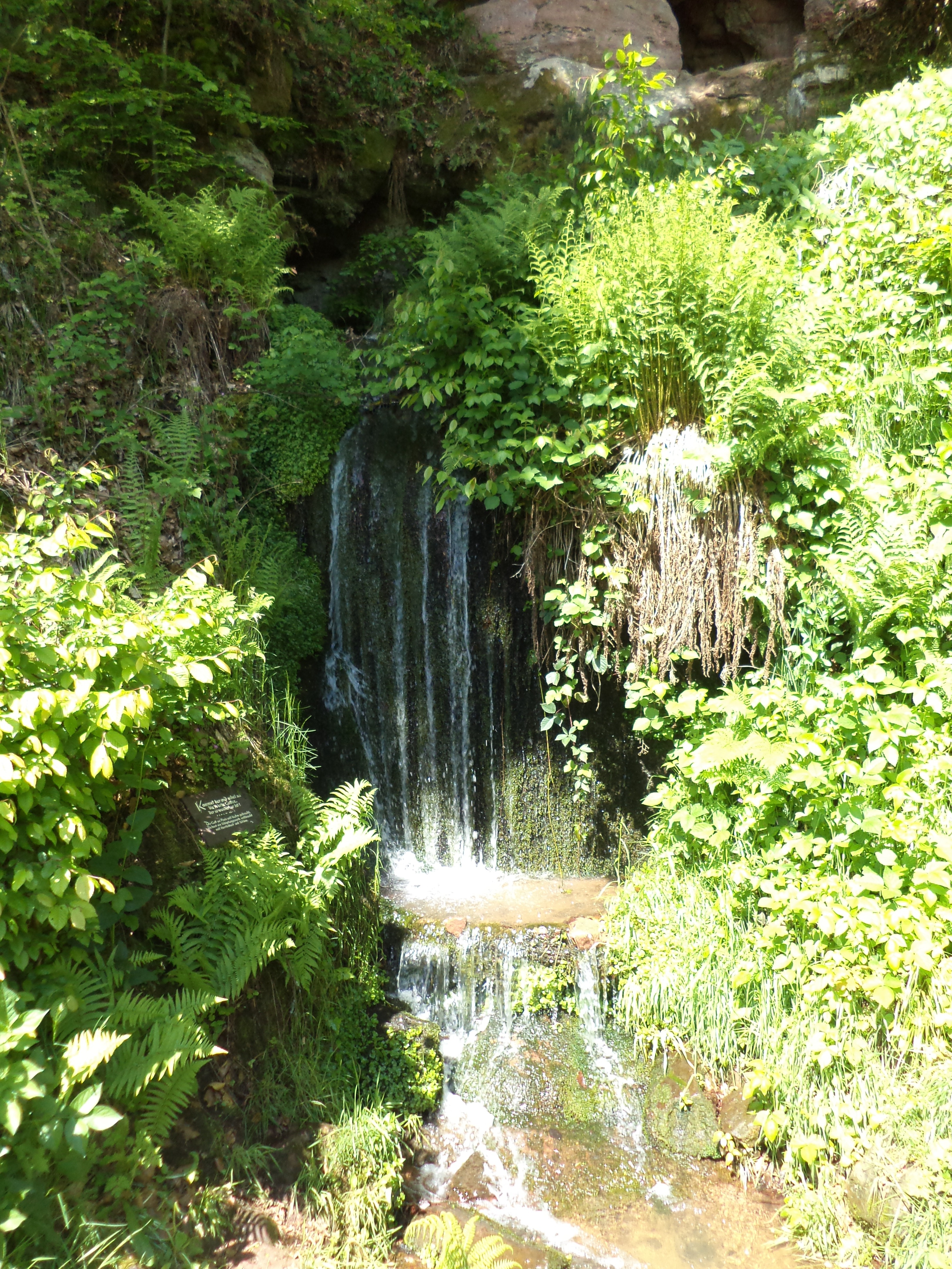 Der Wasserfall an der Zittenfeldener Quelle (ND) im Mai 2013